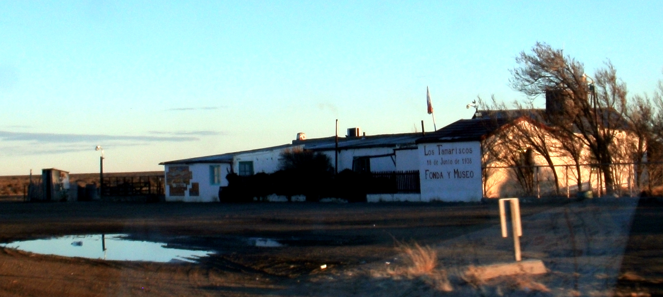 Museo del caserio